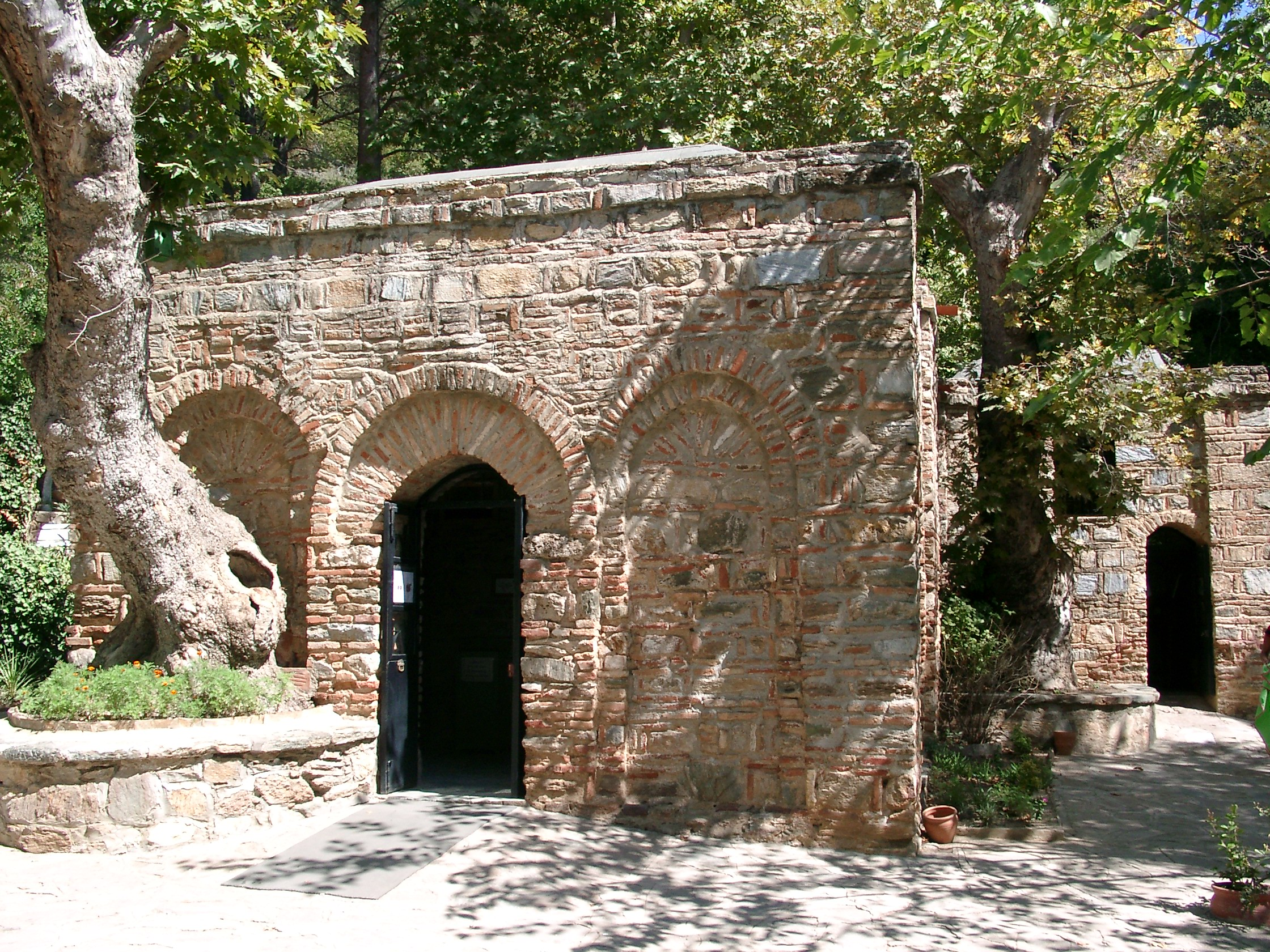 Meryemana (Marien-Haus) ist das angebliche Sterbehaus der hl. Maria.